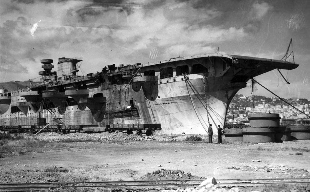 La portaerei Aquila a ormeggiata alla banchina del porto di Genova nel 1946 in attesa della decisione sul suo destino